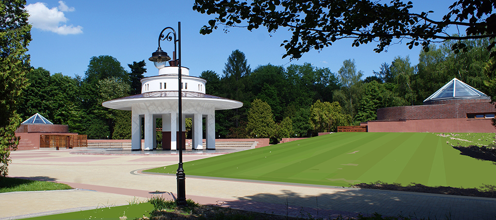 Амфітеатральний комплекс на 400 місць парку-пам'ятки садово-паркового мистецтва «Парк курорту Моршин» в м. Моршин Львівської області (2012-2016)